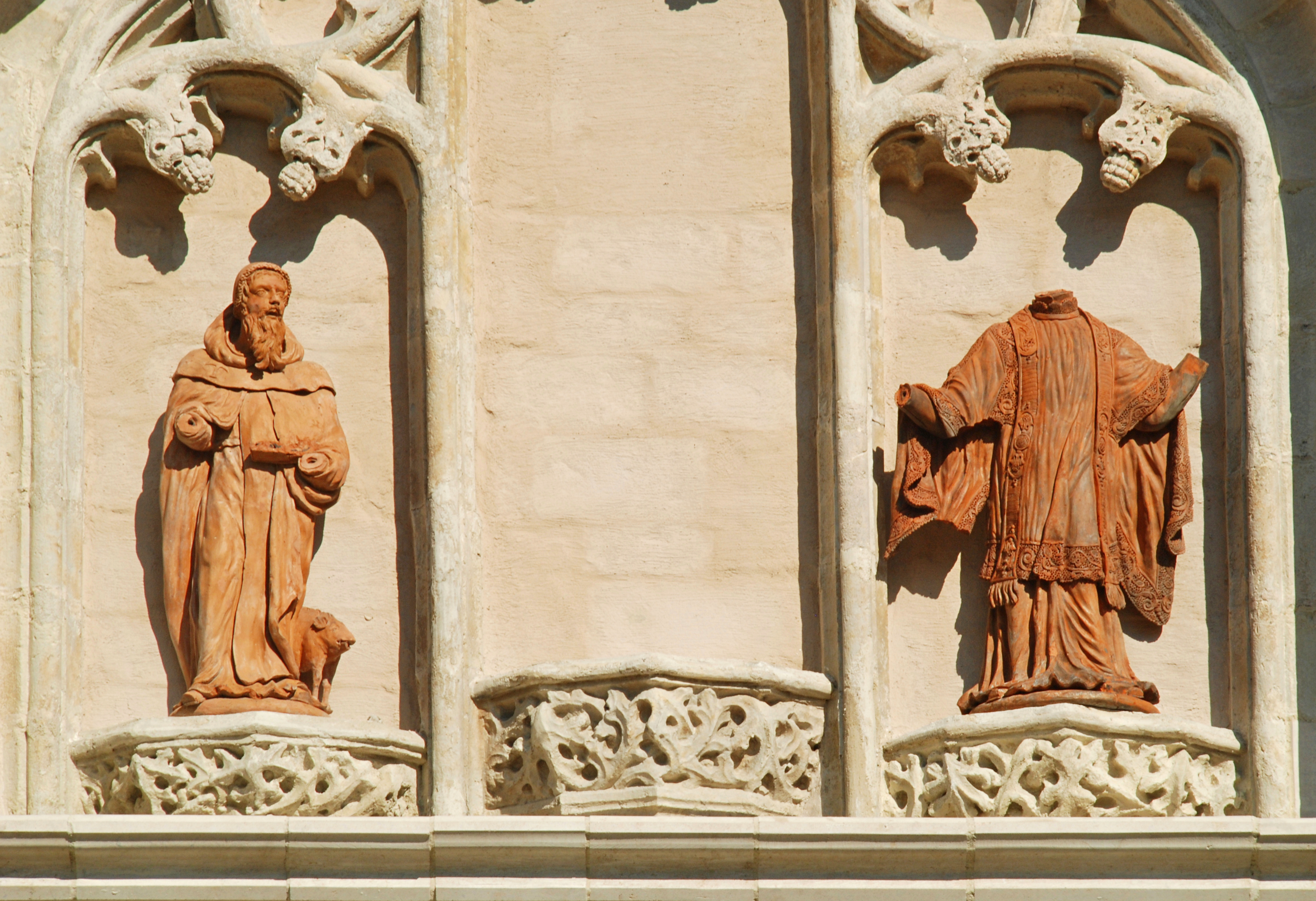 Belgique - Brabant flamand - Machelen - Église Sainte-Gertrude This photo of immovable heritage has been taken in the Flemish Region